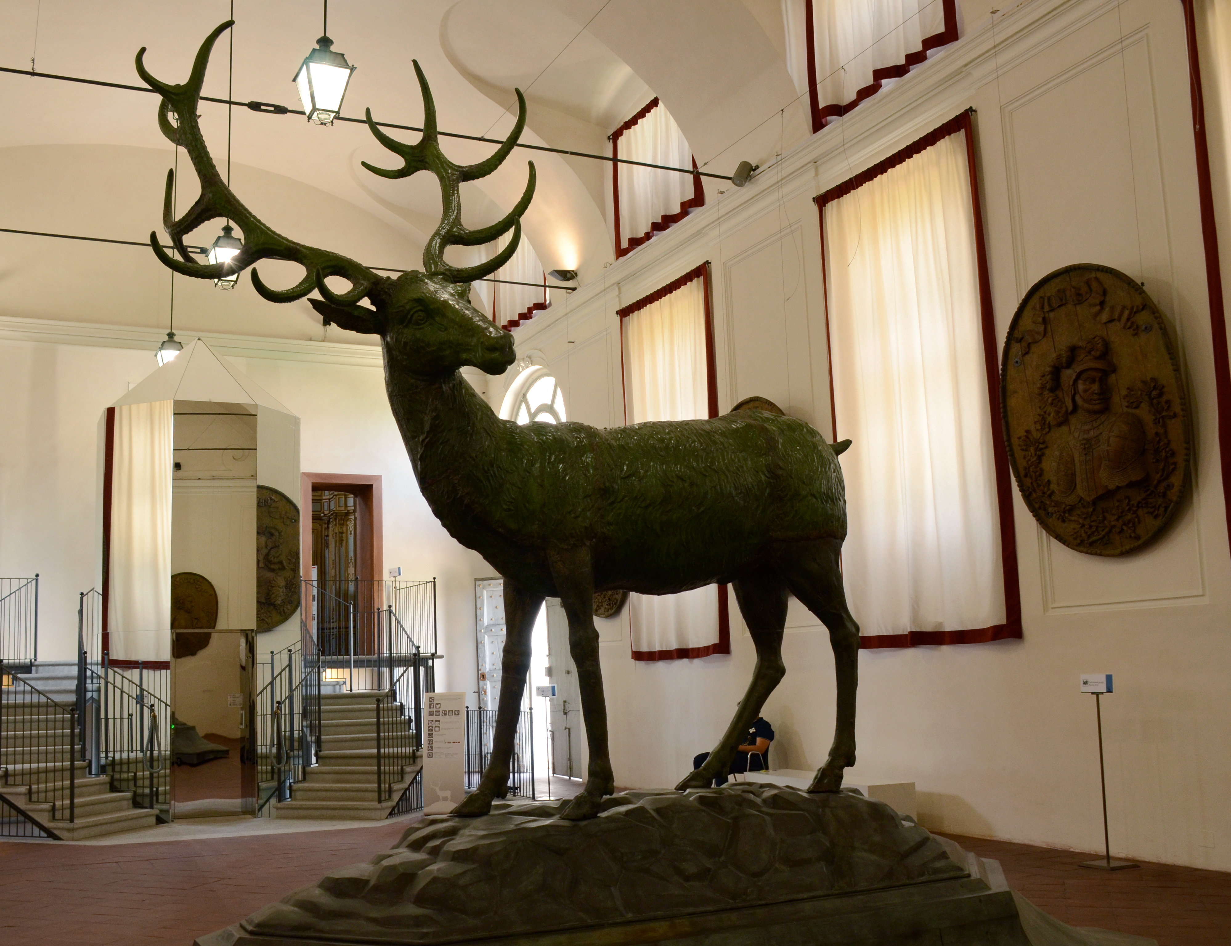 Il Cervo, originale di Francesco Ladatte ( 1766 ), bronzo, rame et foglia d'oro. Musealizzato nella Palazzina di Caccia per motivi di tutela.